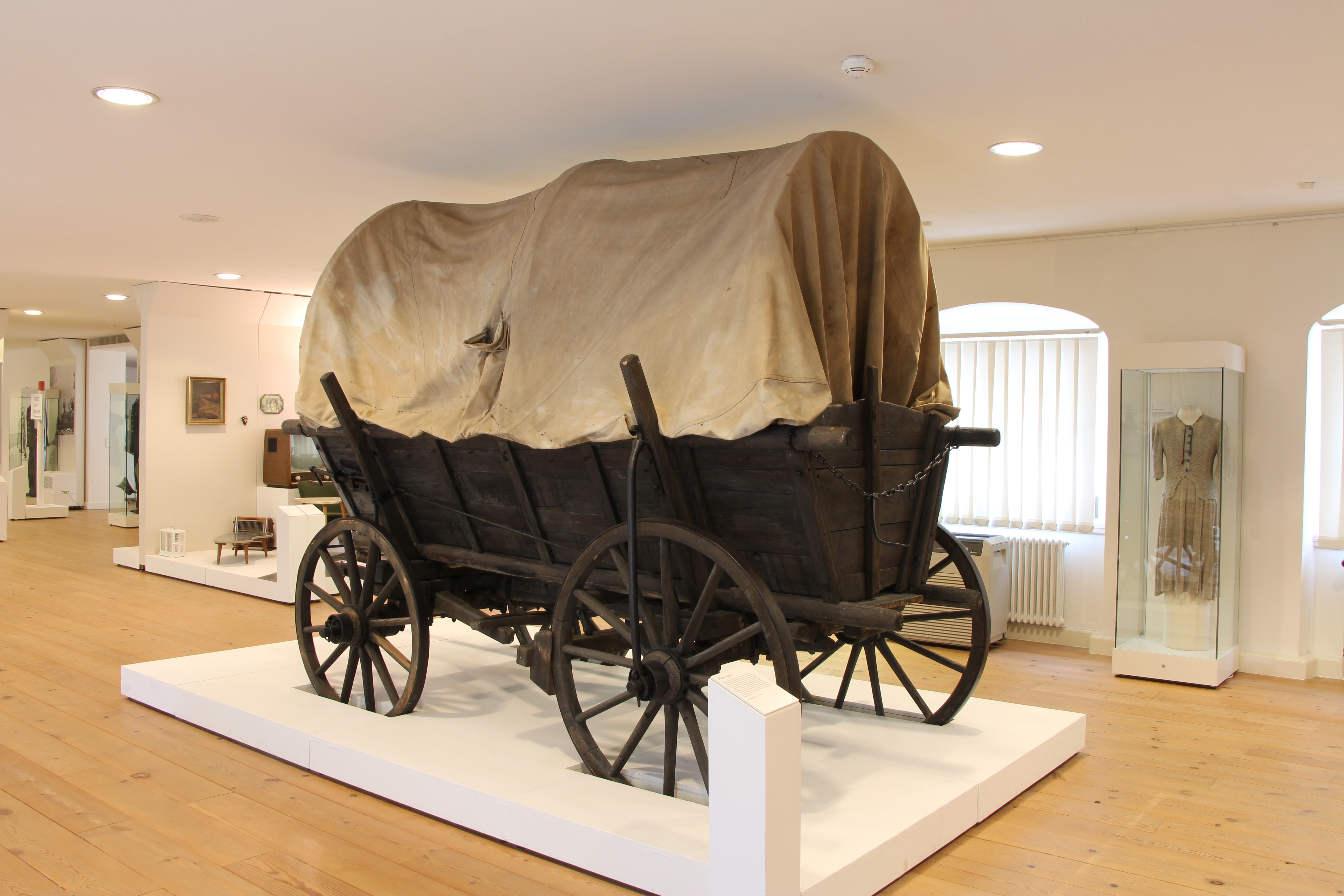 Braunschweigisches Landesmuseum. Wikimedia Deutschland. Juni 2014. Planwagen von Heimatvertriebenen.